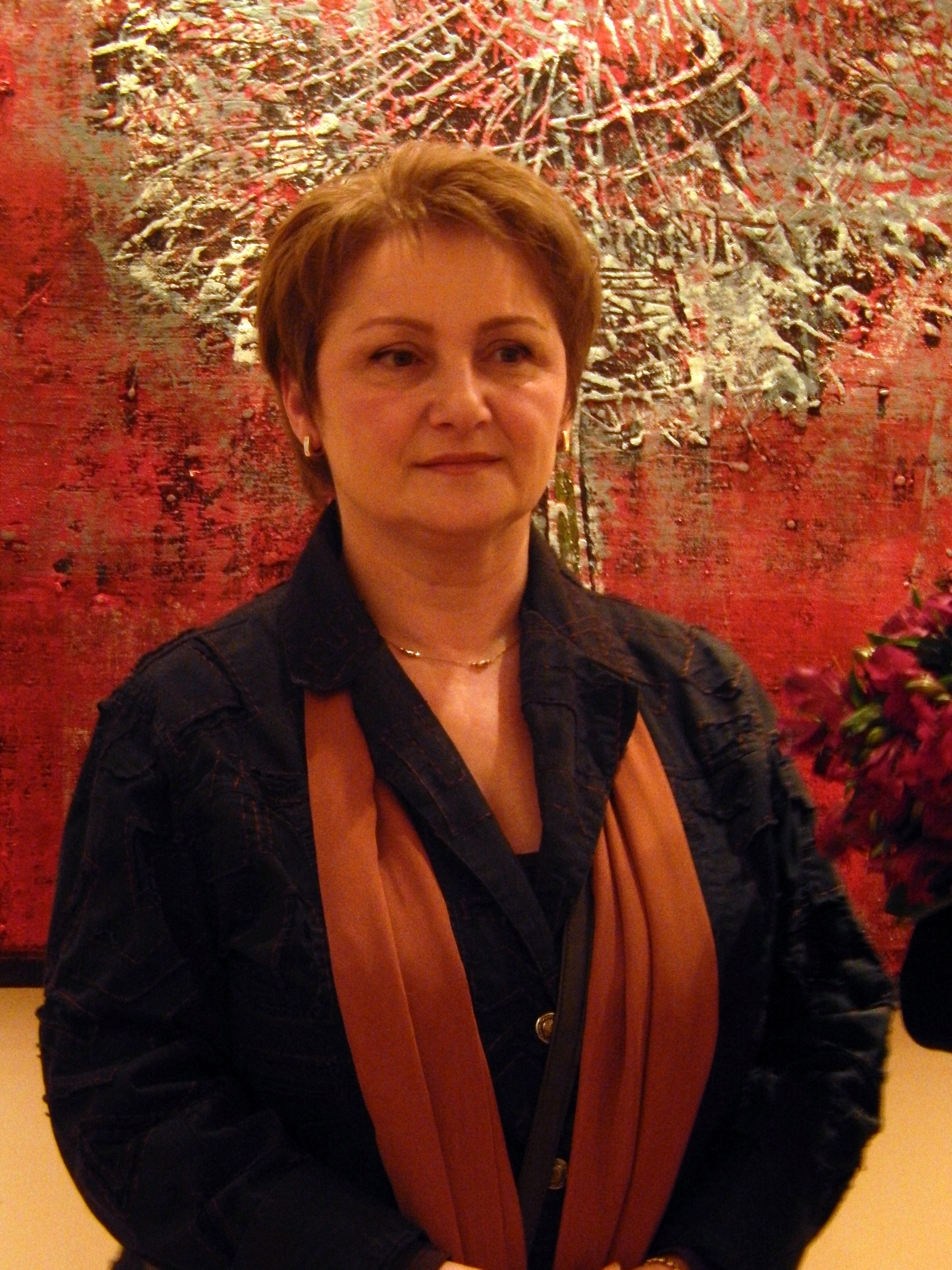 Քանդակագործ Նունե Թումանյան